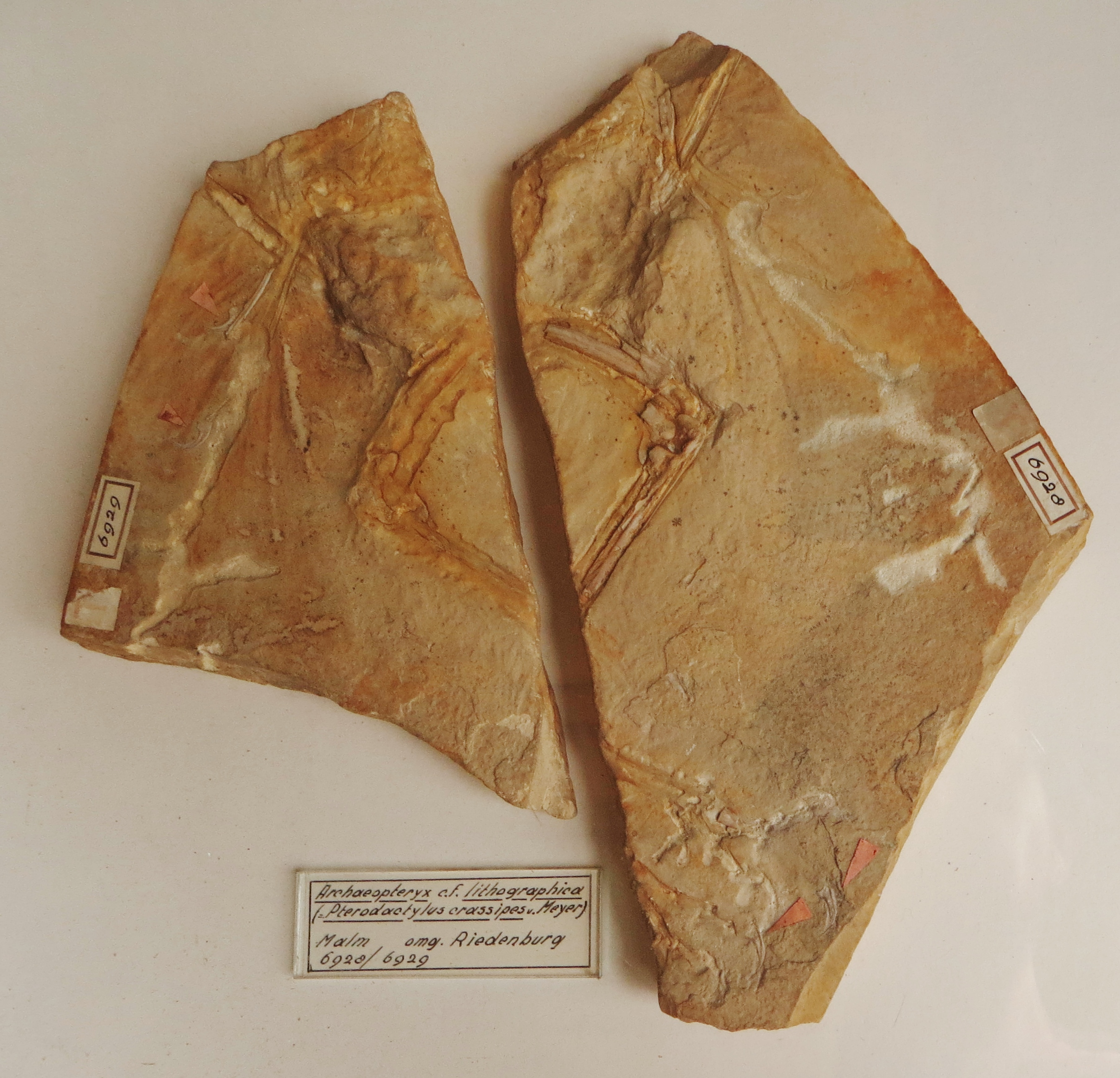 Fossil of Archaeopteryx- Took the picture at Teylers Museum, Haarlem